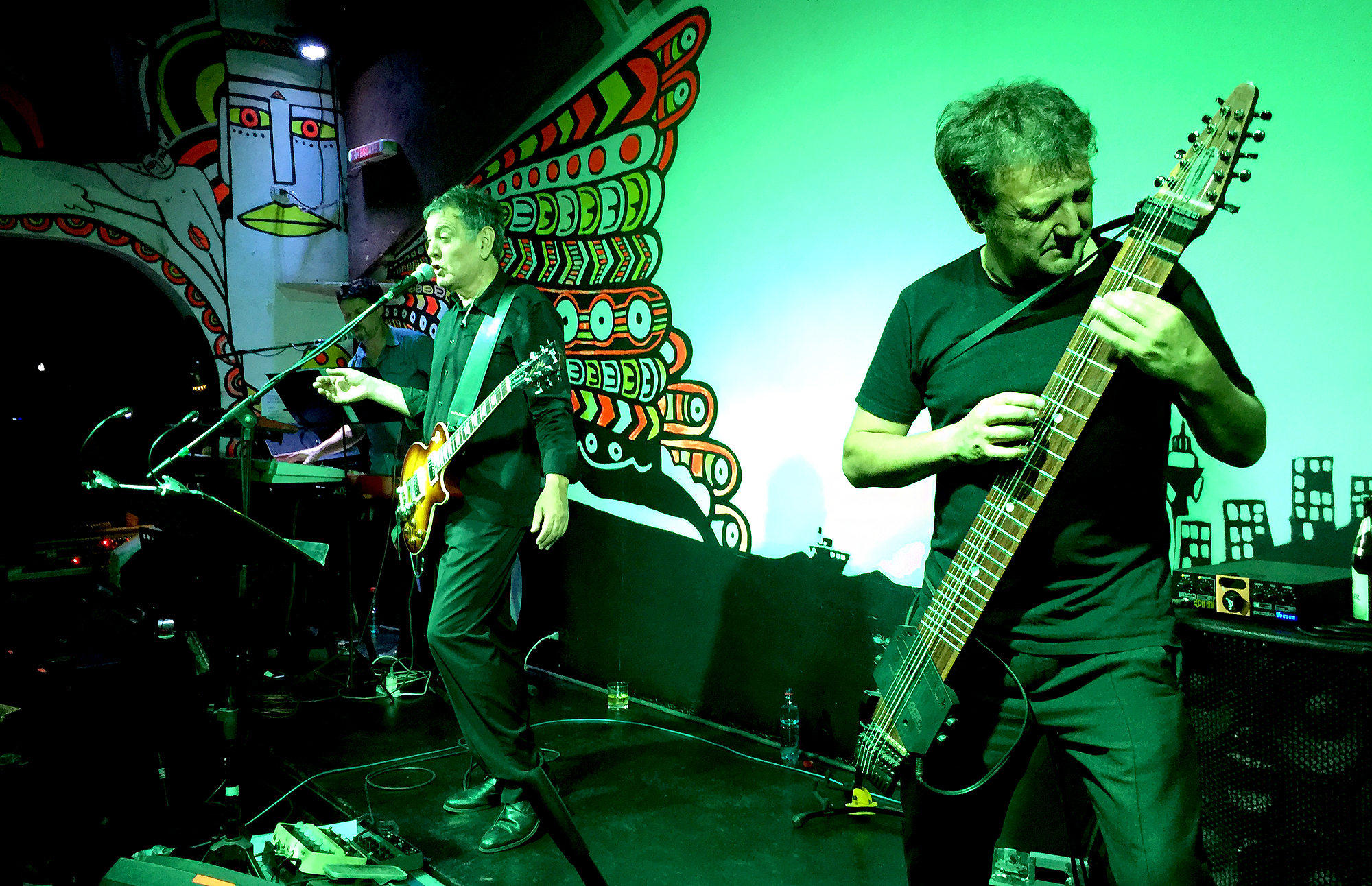 Presentación de Electrodoméstico en el Bar el Clan de Santiago. 19 de Diciembre de 2015. Carlos cabezas en guitarra y Silvio Paredes en Chapman Stick